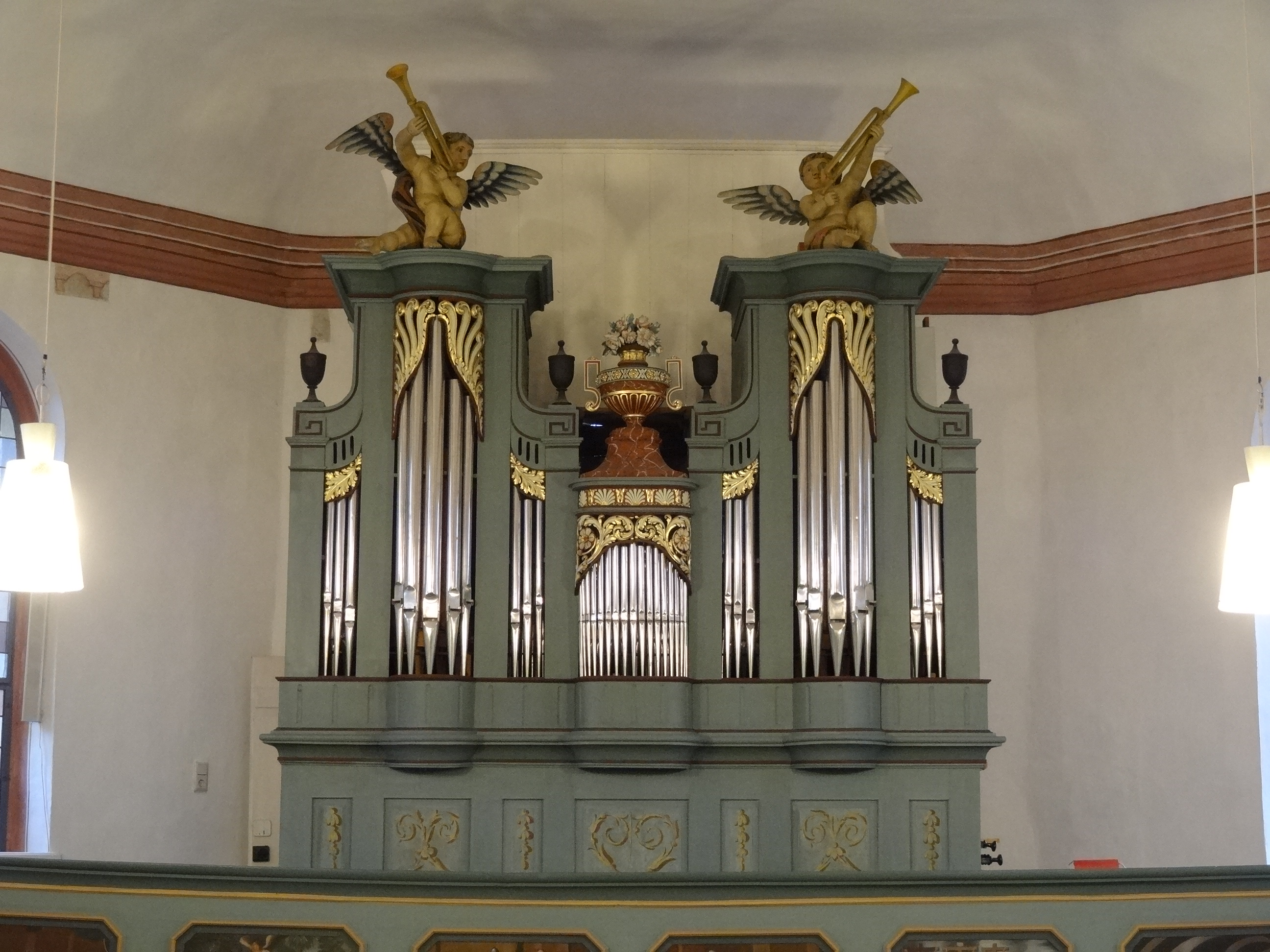 St. Michaelis Oberkleen